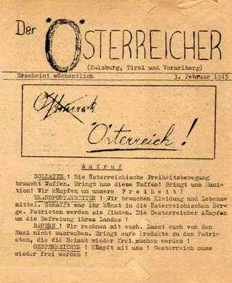 Von der OSS hergestelltes Propagandaflugblatt